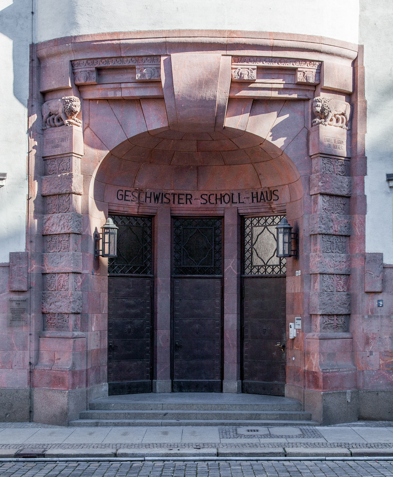 Geschwister-Scholl-Haus, erbaut 1908–1910. Bauschmuck von Georg Wrba